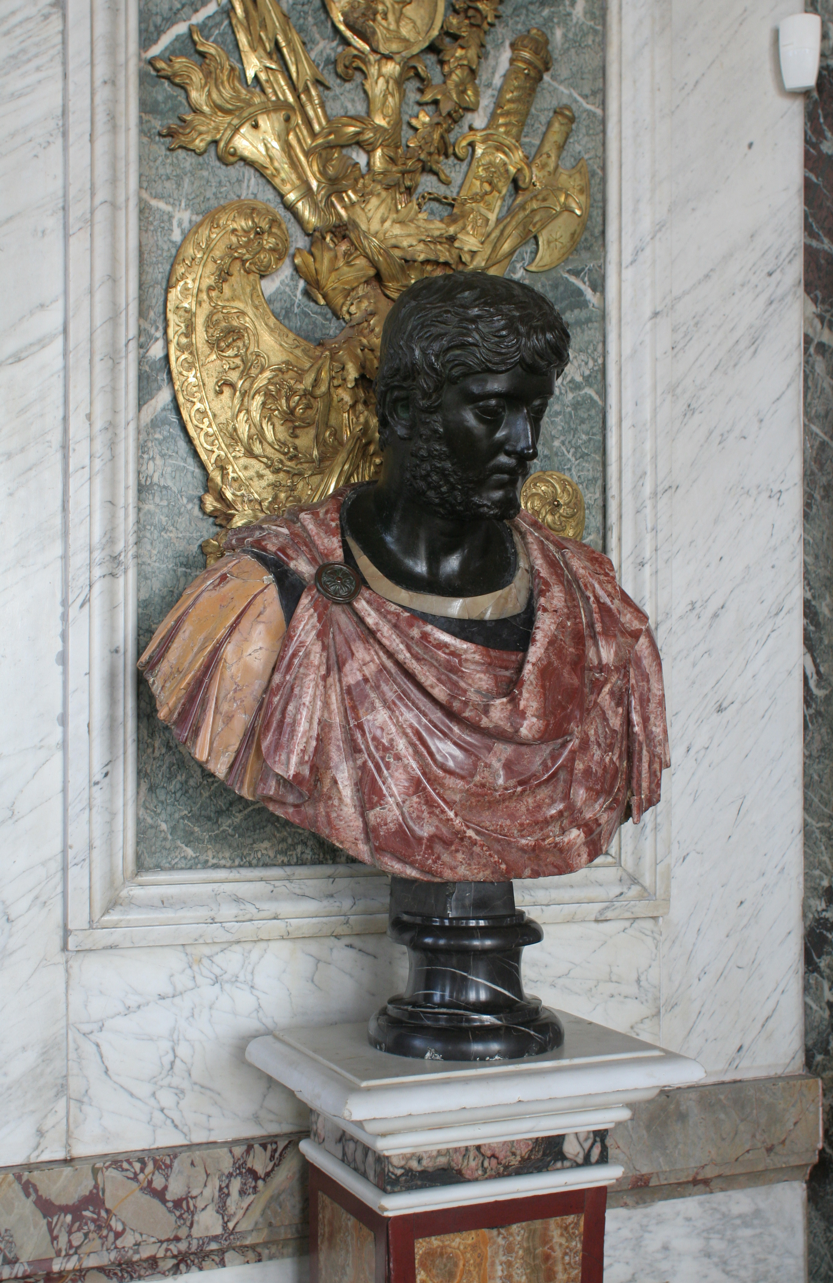 Château de Versailles, salon de la paix, buste de l'empereur romain Commode en bronze, marbre et onyx.